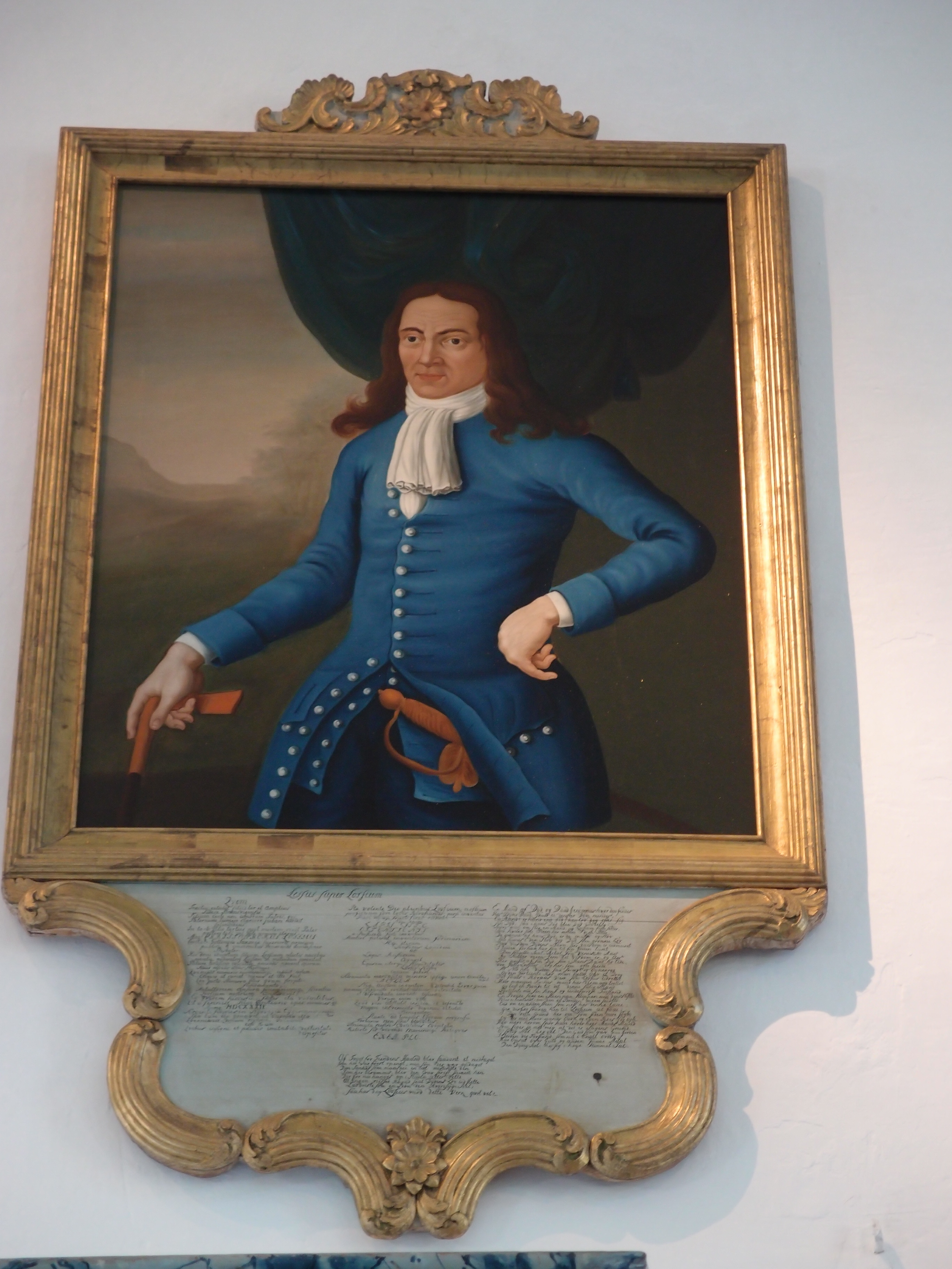 Maleri av Lorentz Lossius (1589-1654), Røros Kobberverks første direktør. Malt av Peder Andersen Lilje, ca. 1670